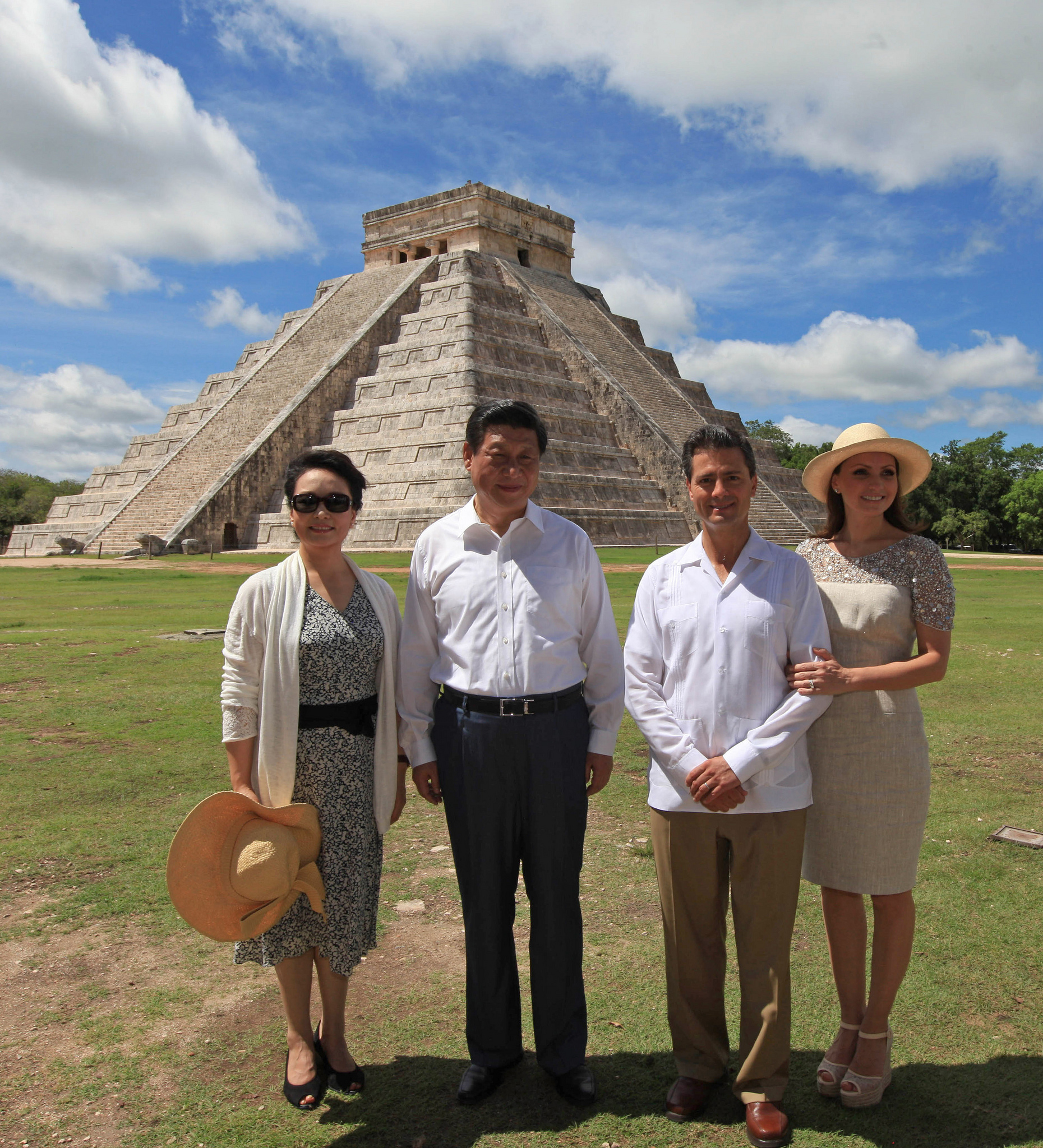 Enrique Peña Nieto y Xi Jinping con sus respectivas esposas. Visita guiada por la Zona Arqueológica de Chichén Itzá. Yucatán, México. 6 de junio de 2013.